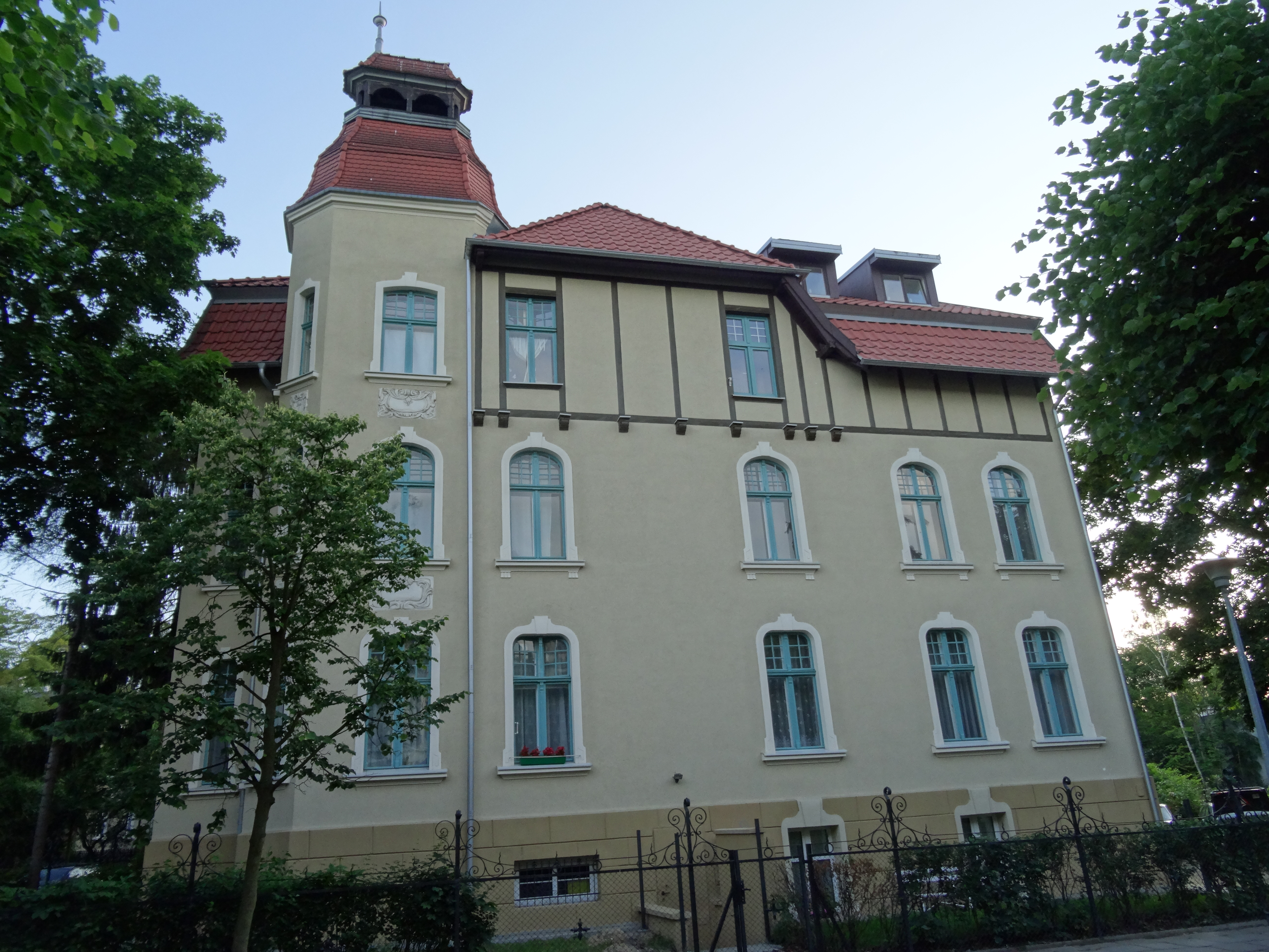 Sopot Dolny, ul. Lipowa 9 - willa, 1900-1904